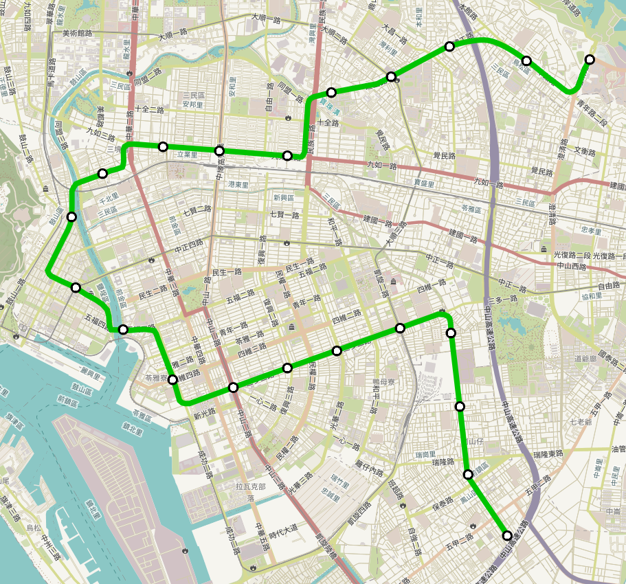 1984年運委會規劃的高雄捷運中運量綠線